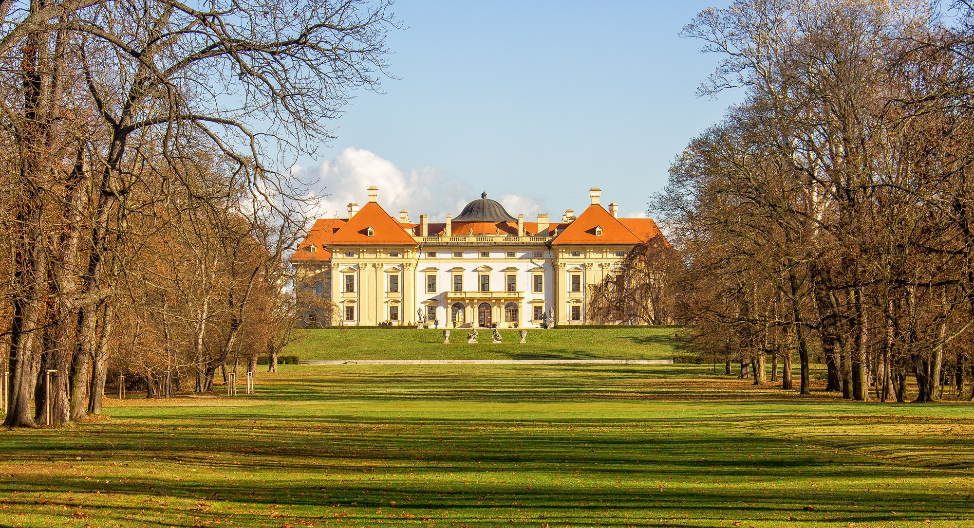 Zámek Slavkov u Brna